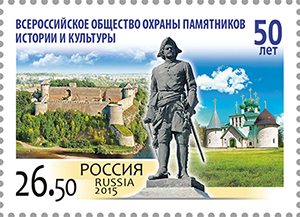 50 лет Всероссийскому обществу охраны памятников истории и культуры. На марке изображены Ивангородская крепость, Памятник Петру I (скульптор М. М. Антокольский), Подворье Троице-Сергиевой Лавры «Куликово поле» (см. описание здесь).